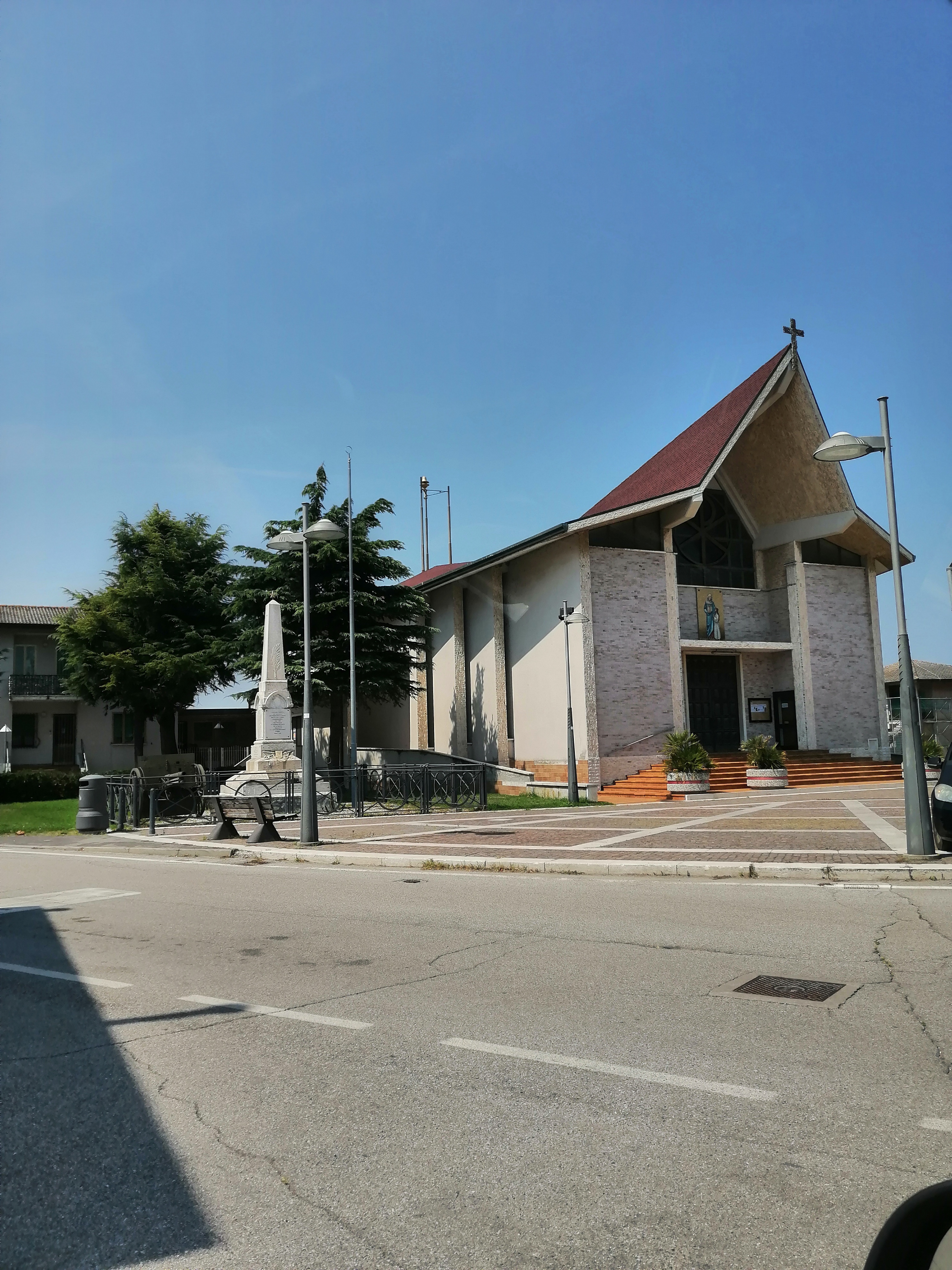 Chiesa di parrocchiale e monumento ai caduti.